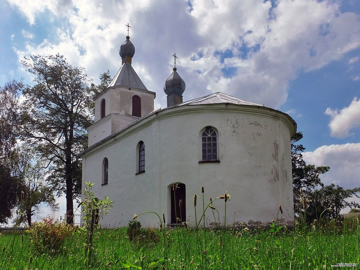 Сухадол. Свята-Варварынская царква